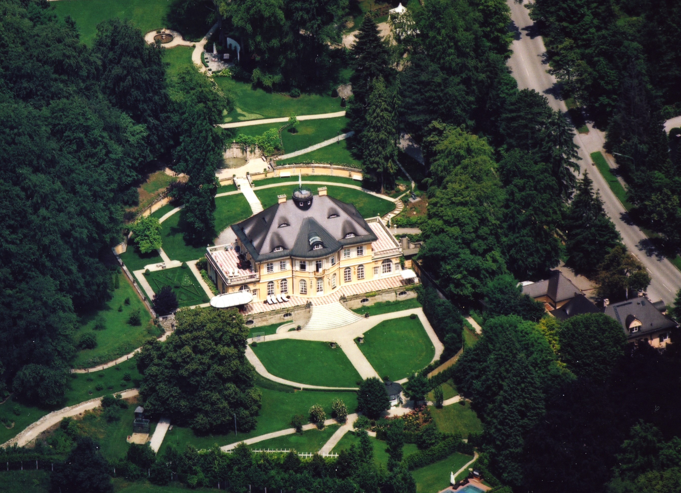 Palais Sonnenhof, Hanfelder Straße 75–79, Starnberg